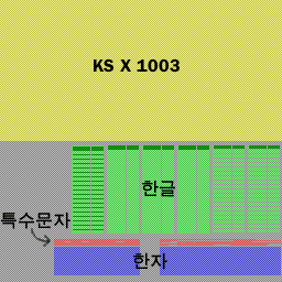 한글 상용 조합형 인코딩의 시각적인 구조. 세로 축은 첫째 바이트, 가로 축은 둘째 바이트에 해당하며 한 픽셀이 가능한 한 가지 조합에 해당함. 범례 노랑: KS X 1003 초록: 현대 한글 (11172자), 한글 자모 (67자) 및 전각 공백 (U+3000) 어두운 초록: 미완성 현대 한글 (520자) 빨강: 특수문자 파랑: 한자